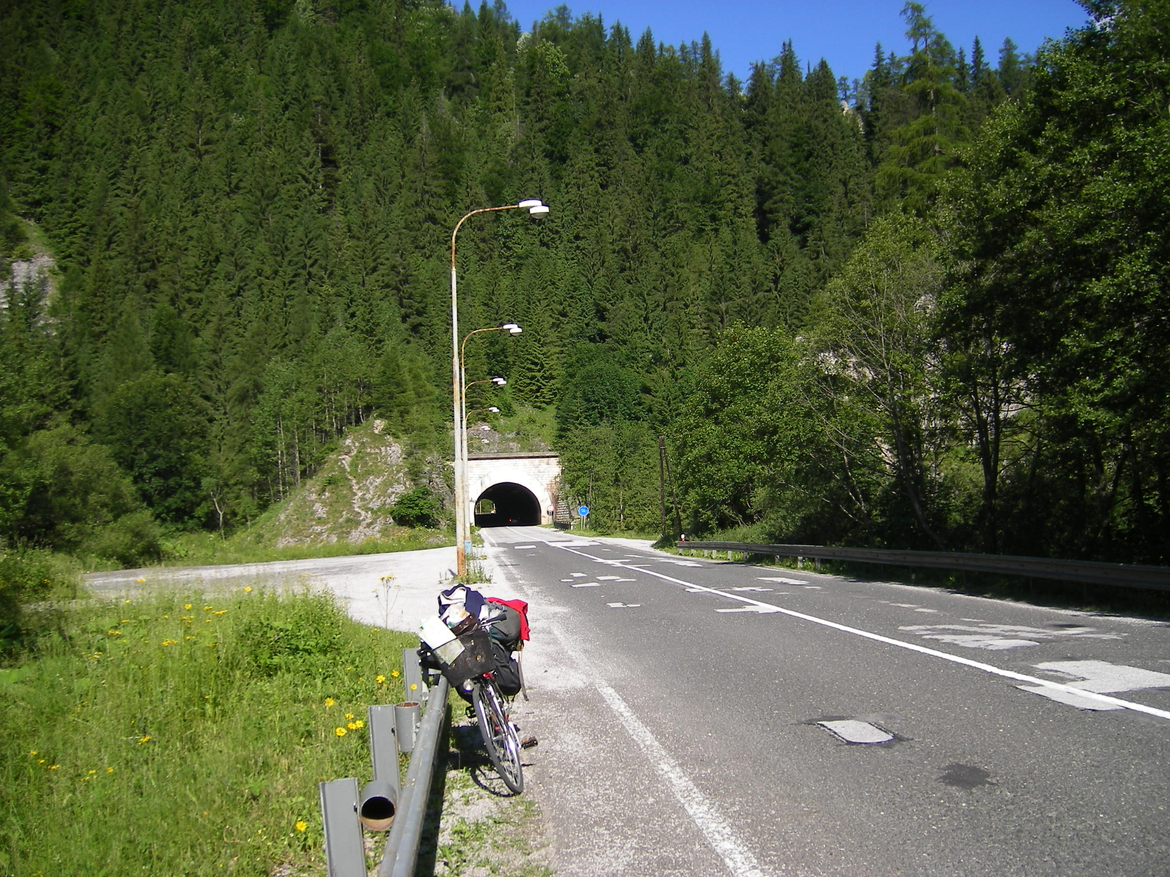 Stratená (okres Rožňava), first road tunnel in Slovakia